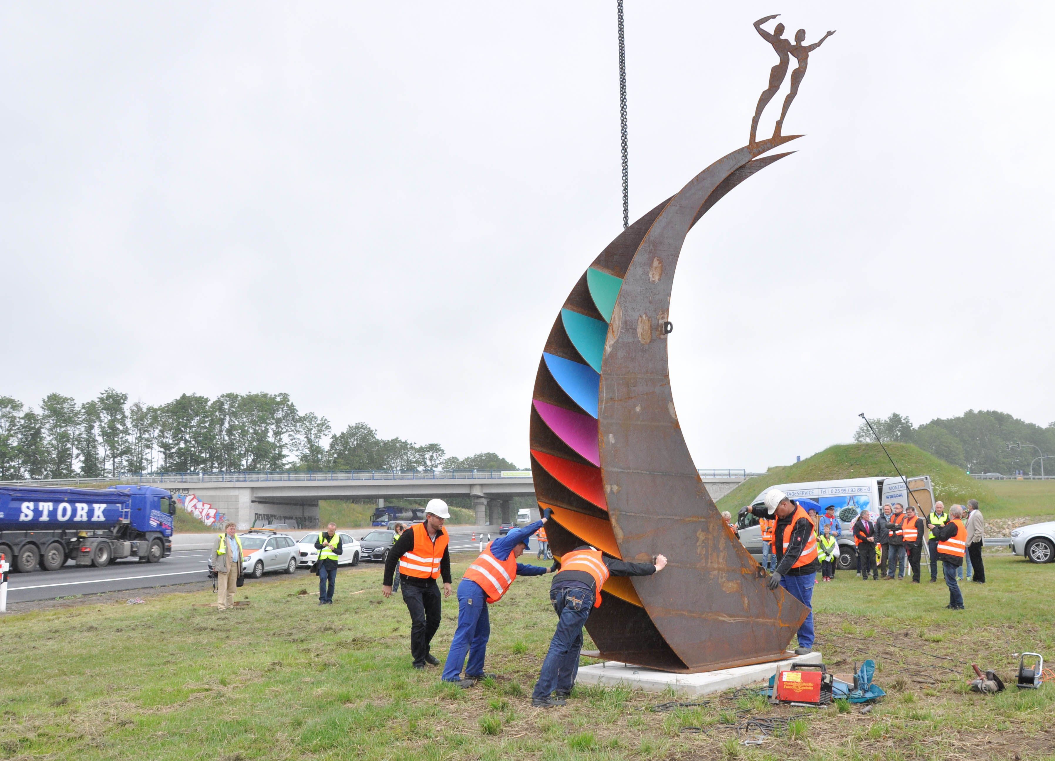 Die Stahl-Skulptur des Künsters Alfred Gockel markiert die A1-Anschlussstelle in Münster-Hiltrup/Amelsbüren.